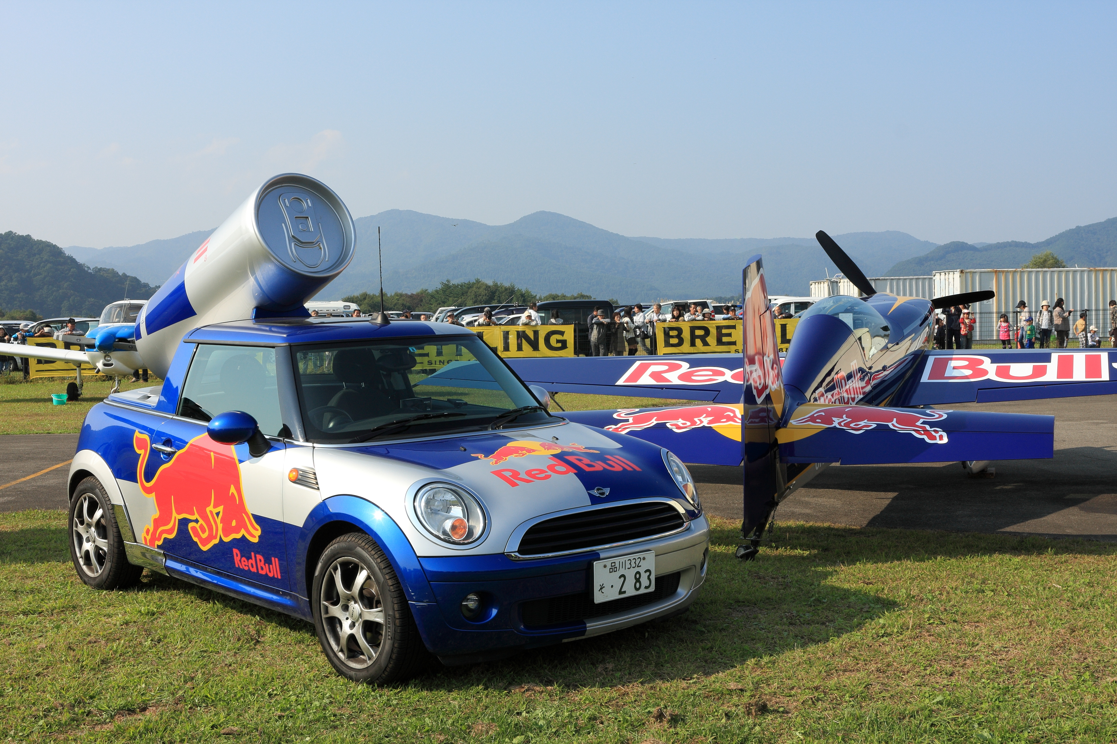 ふくしまスカイパークで撮影された、レッドブルのサンプリングカーとEXTRA300S